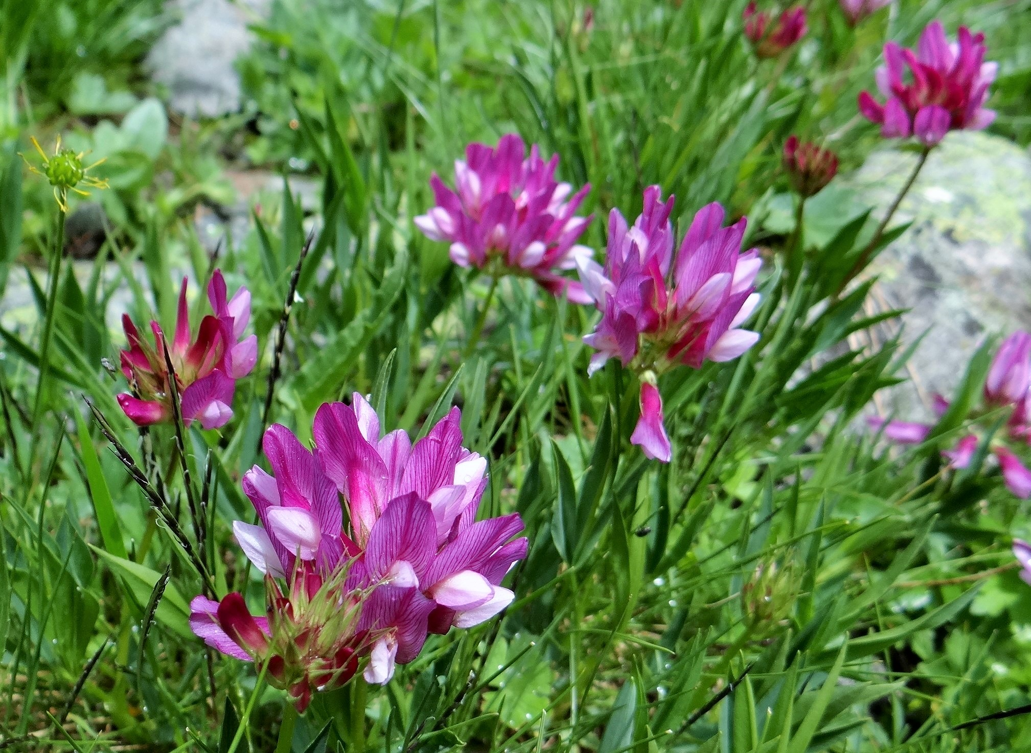 Trèfle rouge en Vanoise